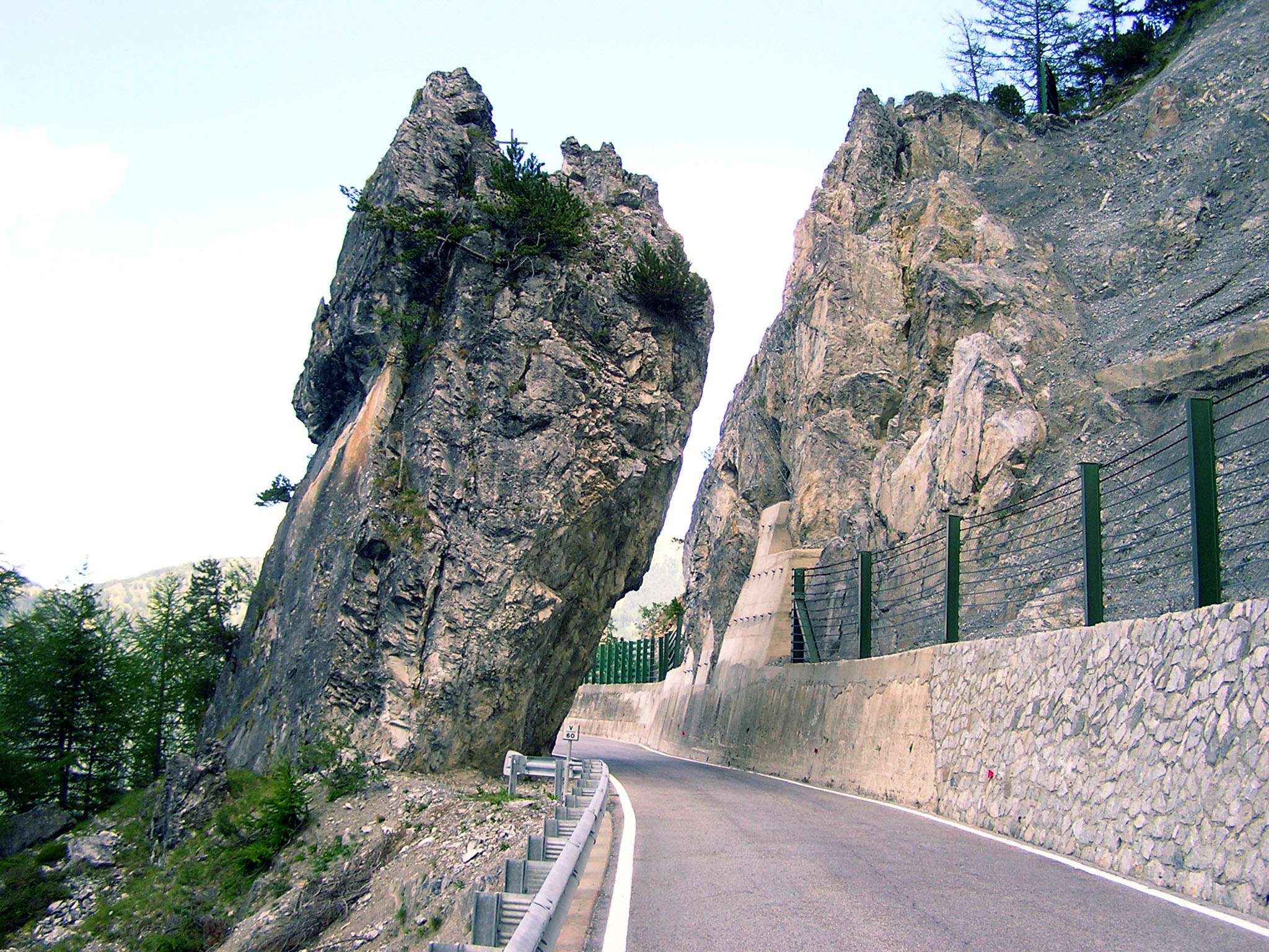 Felsen auf der Nordrampe des Penser Jochs (Südtirol)